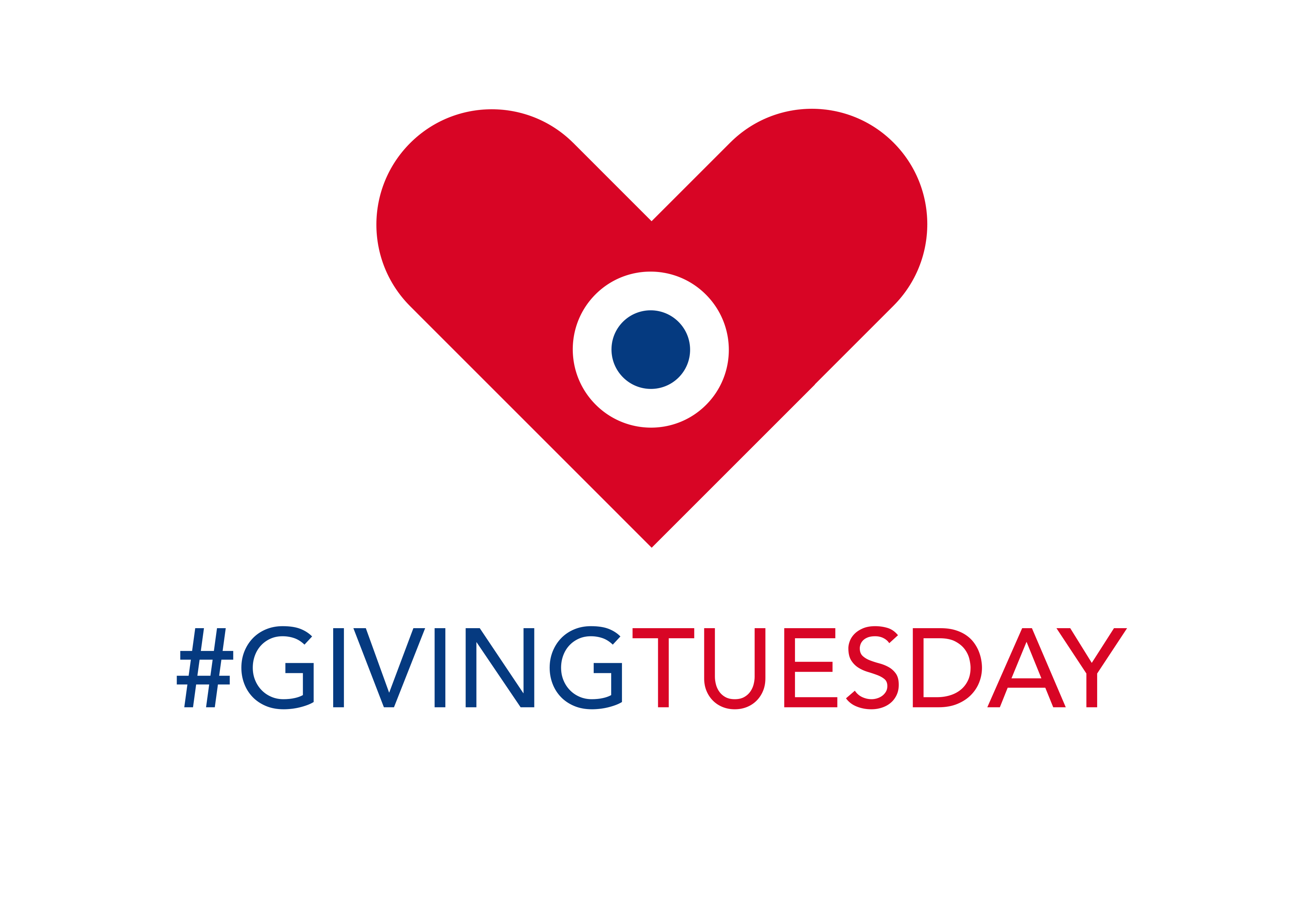 Logo du mouvement français Giving Tuesday